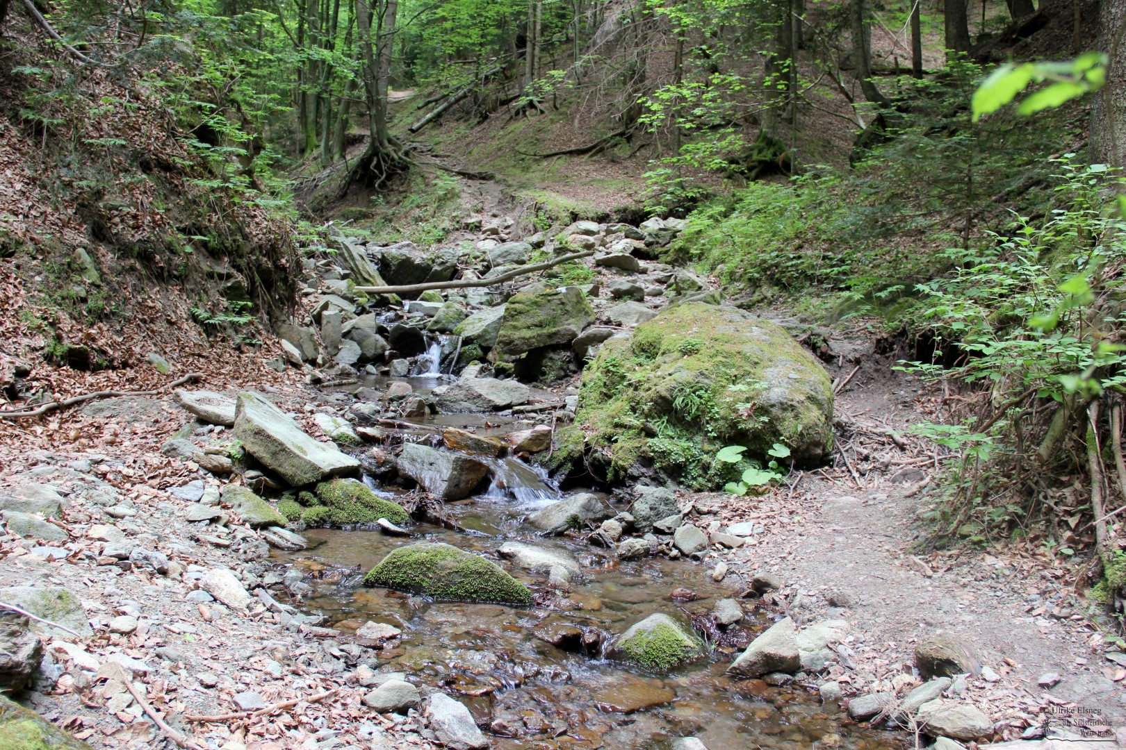 Der letzte Bachübergang am Ende der Heiligengeistklamm